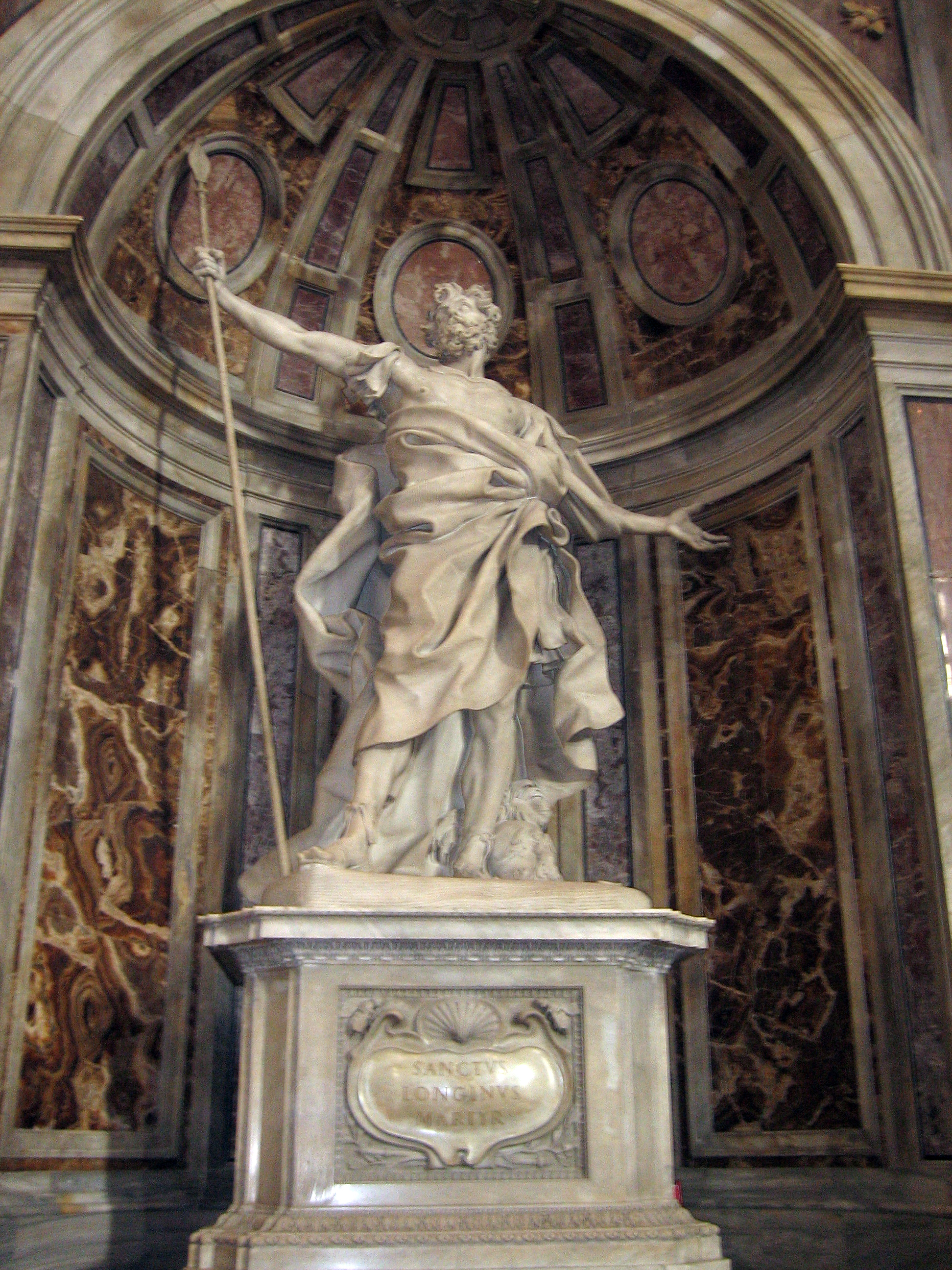 San Longino, mártir.(1631-1638). Basílica de San Pedro, Ciudad del Vaticano.